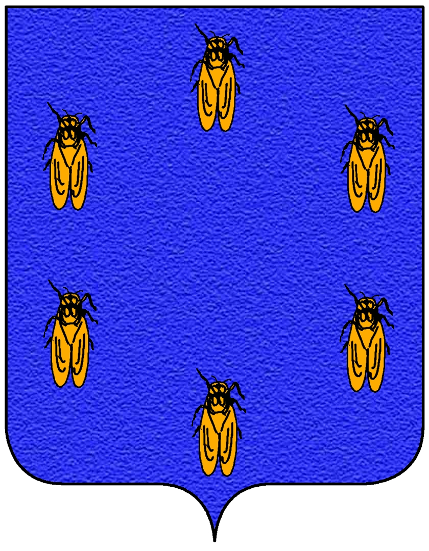 Stemma della famiglia Cicala